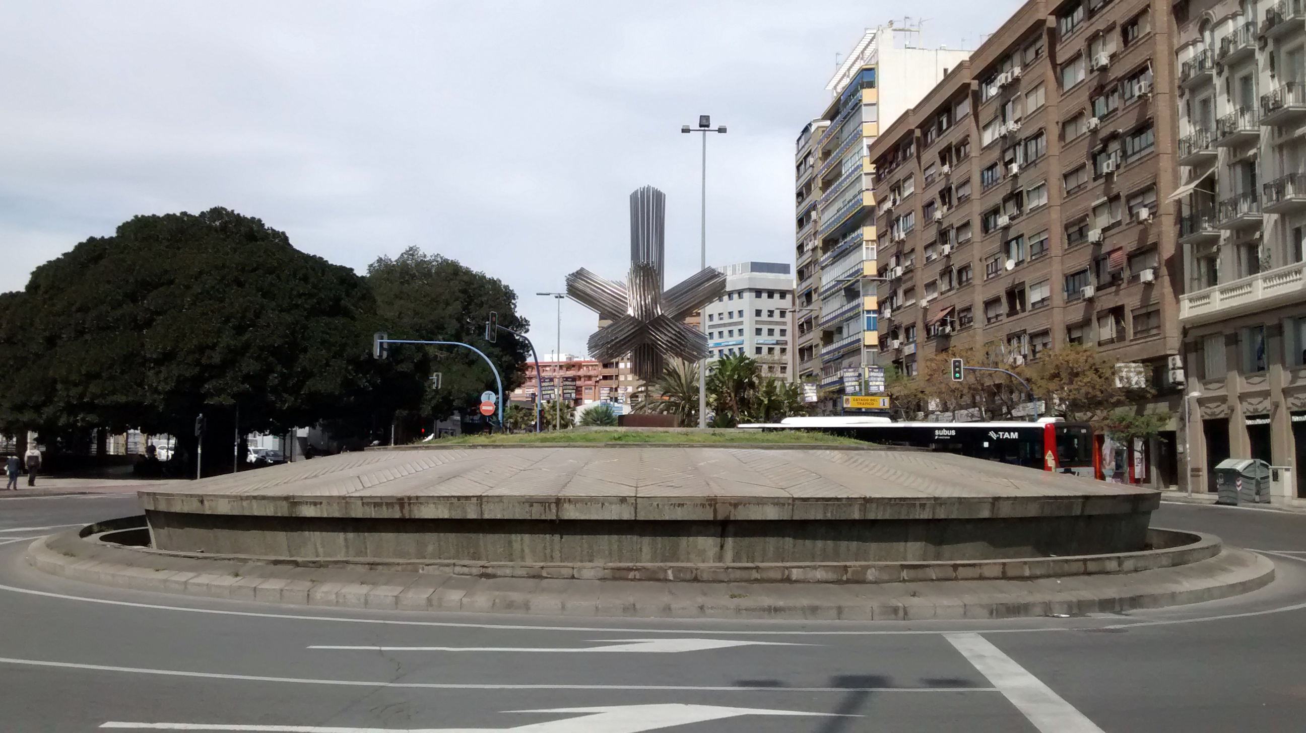 Conocidísima fuente del centro de Alicante, en la intersección de las avenidas de Maisonnave, Óscar Esplá, Salamanca y Aguilera.